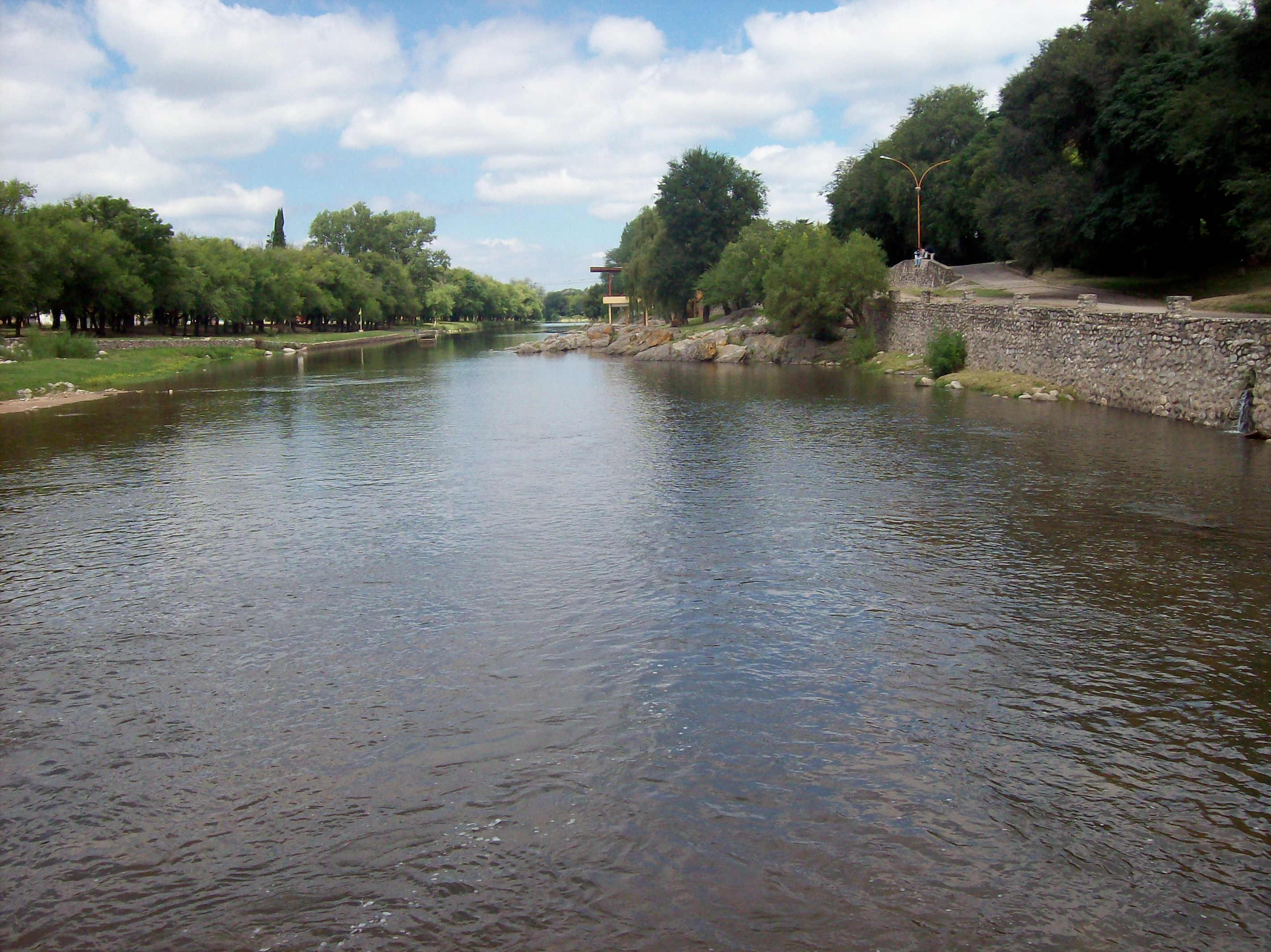 Vista al SO del Río Cosquín, en la ciudad homónima, en la provincia de Córdoba, Argentina